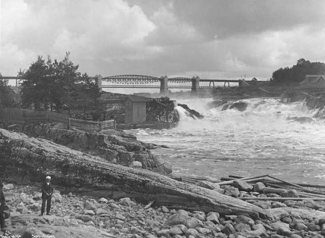 Sarpfossen in Sarpsborg.